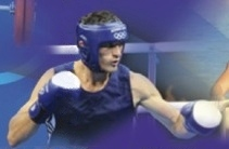 Magomed Aripgadjiev